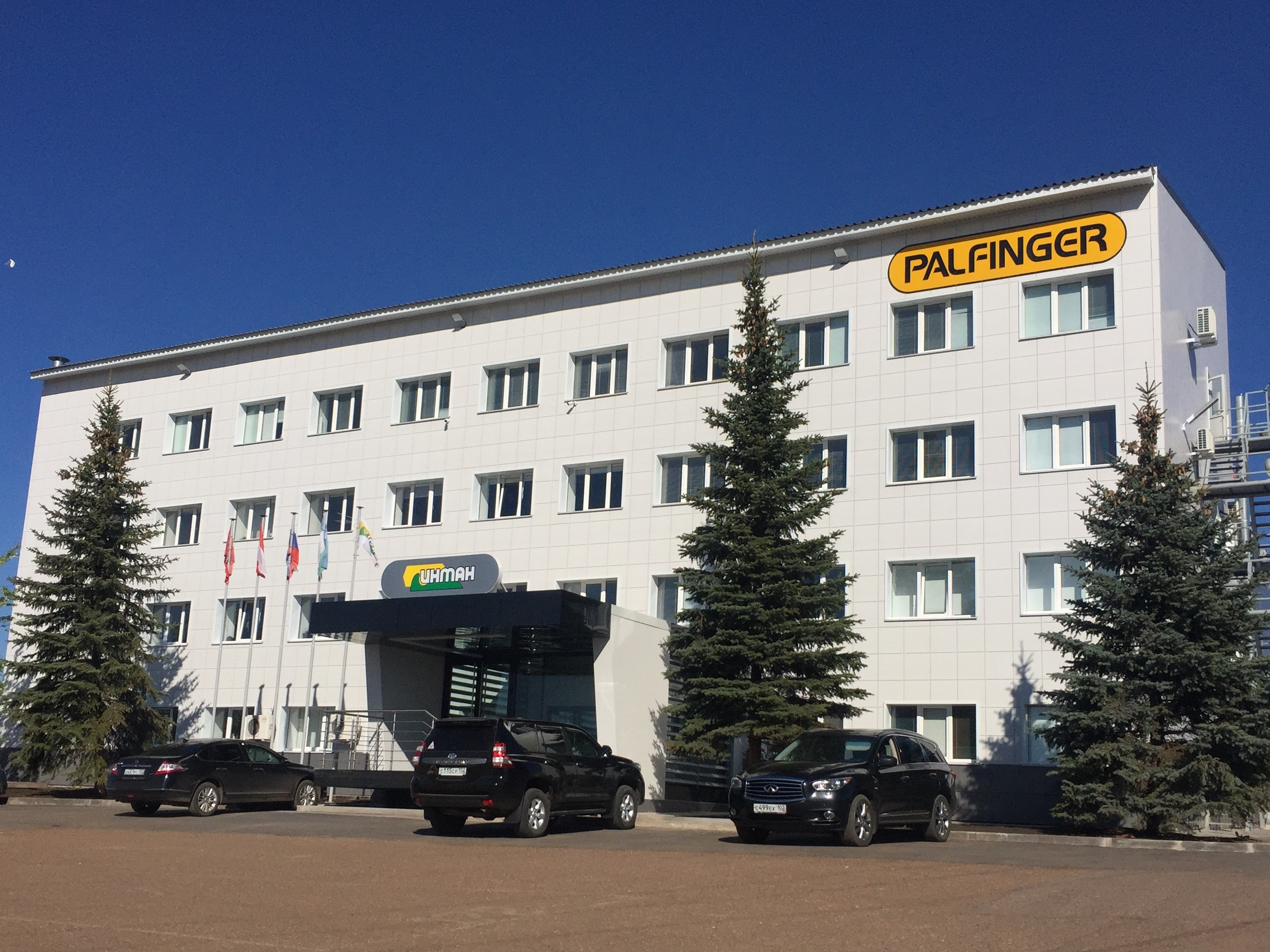 Административно бытовой корпус